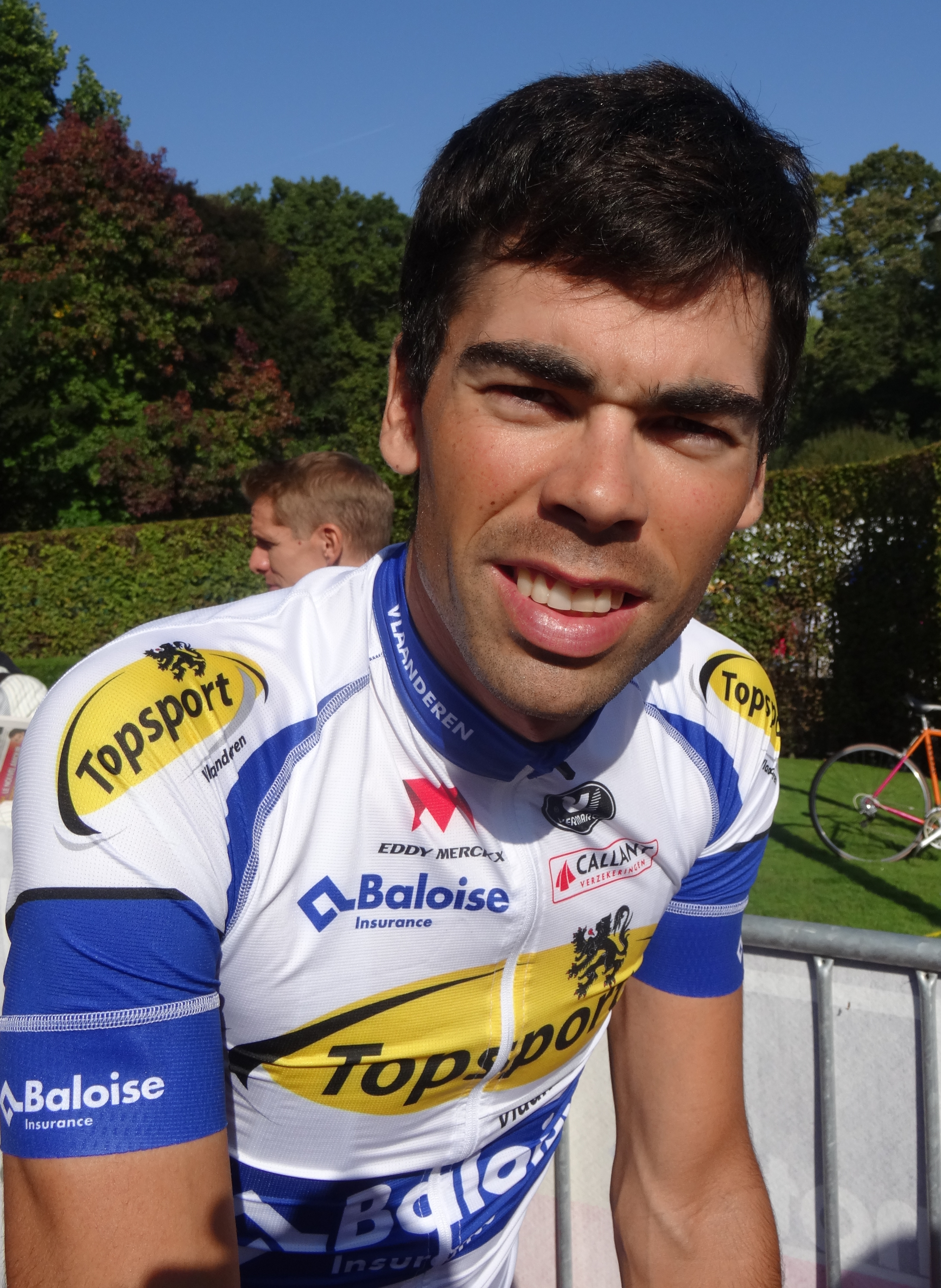 Reportage photographique réalisé le vendredi 3 octobre à l'occasion du départ de la deuxième étape de l'Eurométropole Tour 2014 à Estaimbourg (Estaimpuis), Belgique.